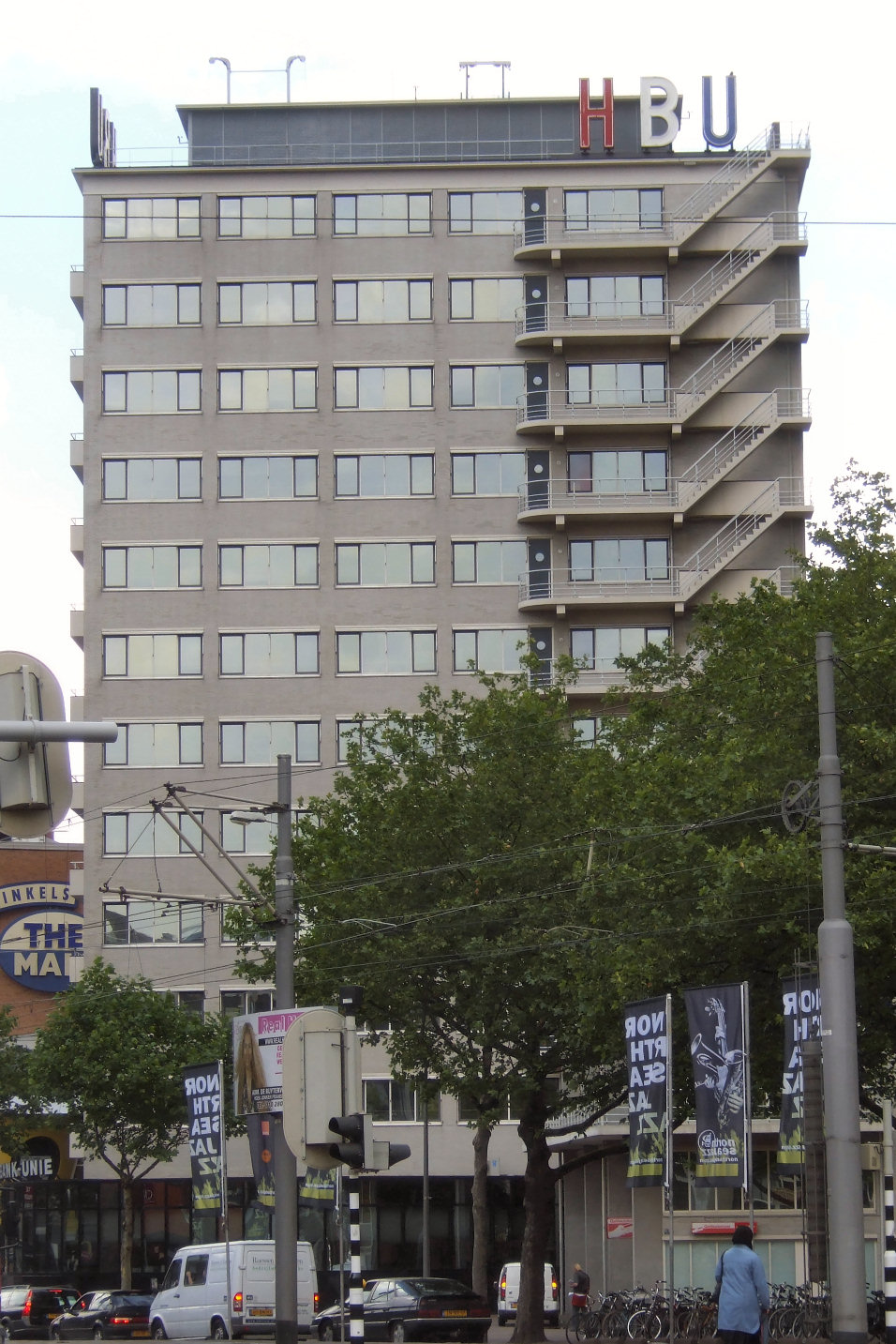 Erasmushuis, in Rotterdam beter bekend als het HBU gebouw.